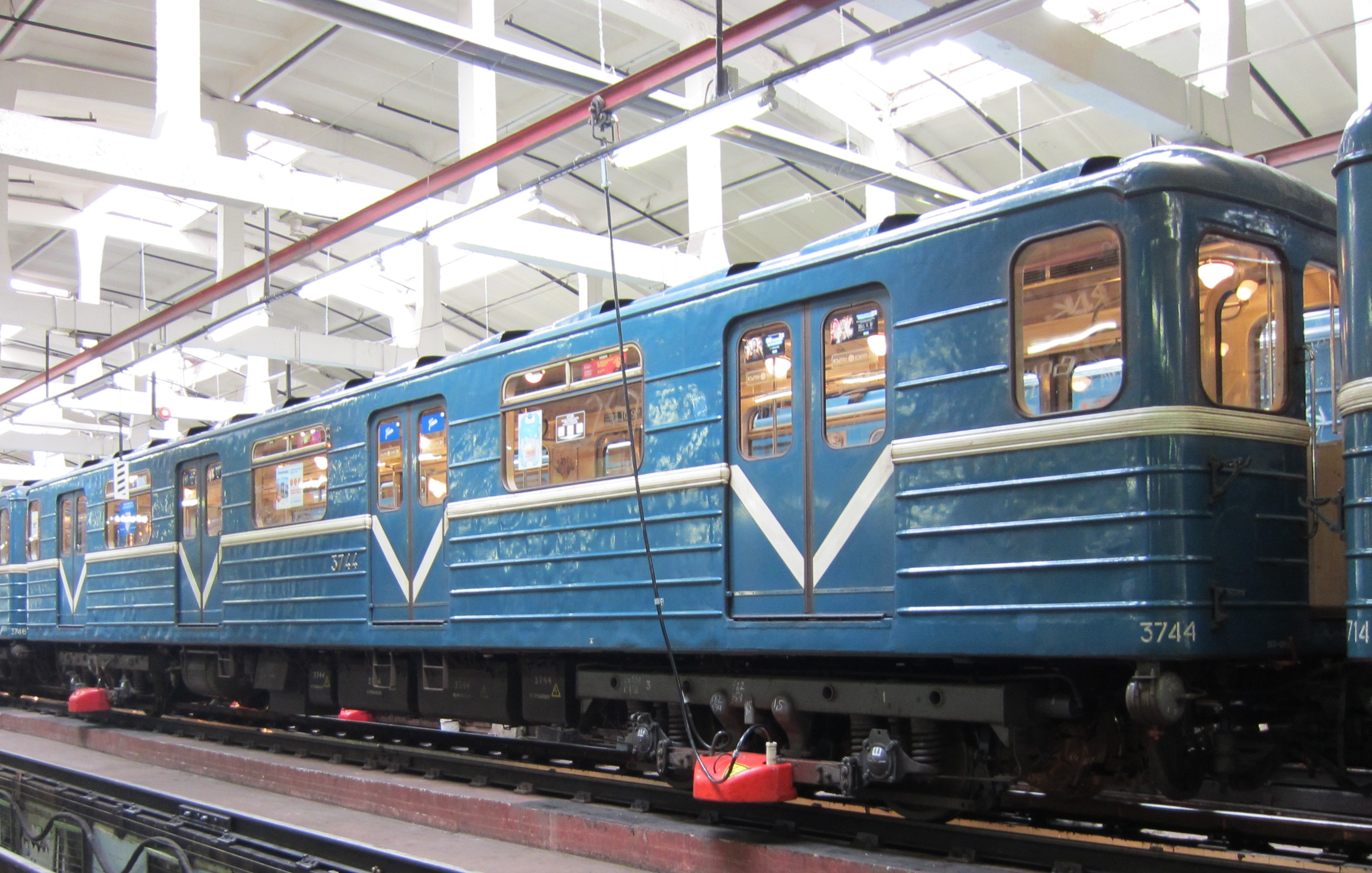 Вагон метро типа Ем № 3744